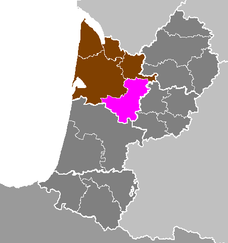 Maps of arrondissements and cantons of France: Département de la Gironde - Arrondissement de Langon.PNG (Région Aquitaine)